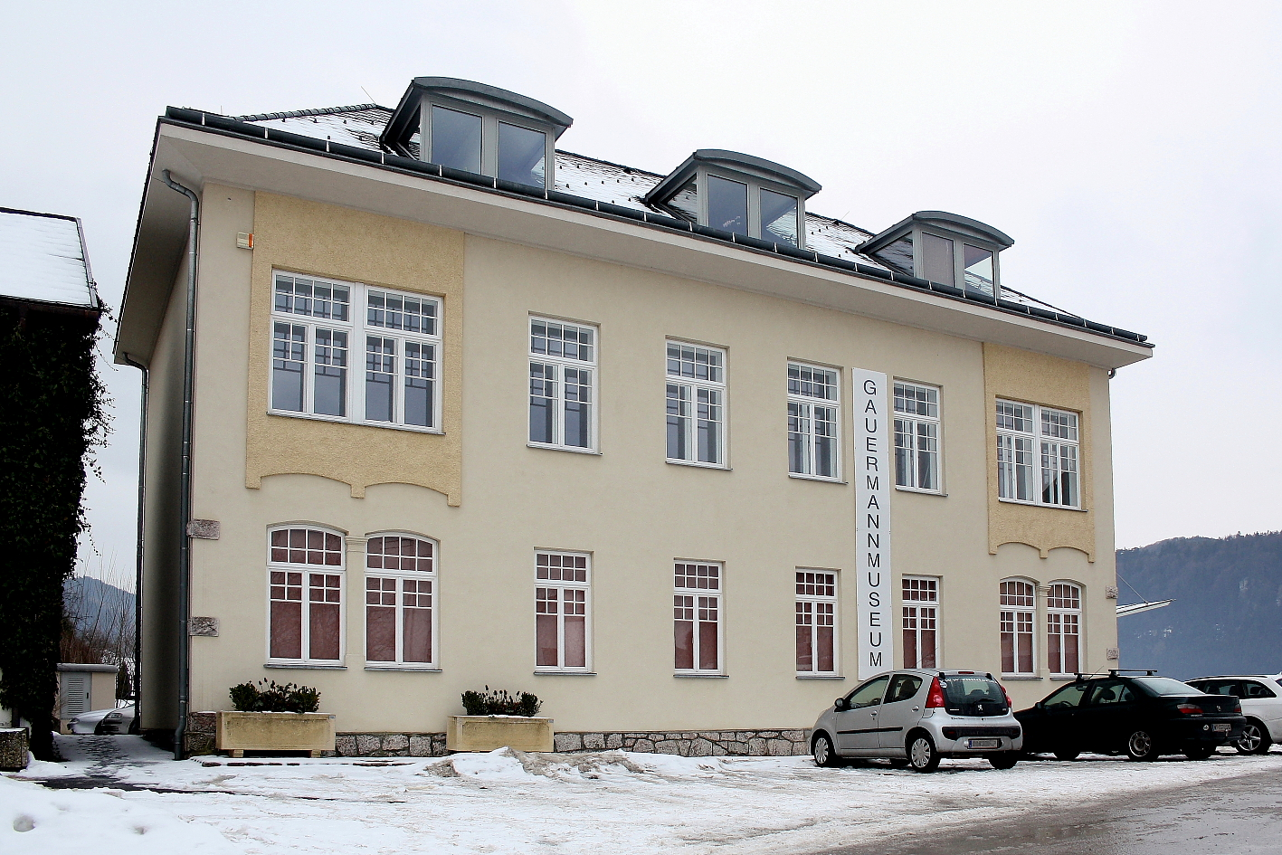 Das Gauermann-Museum in Scheuchenstein, Gemeinde Miesenbach.